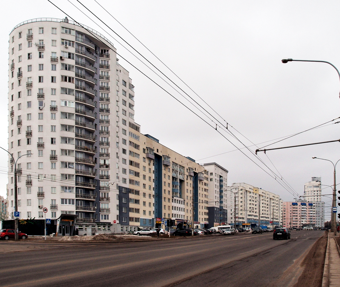 Ihumienski trakt. Ігуменскі тракт